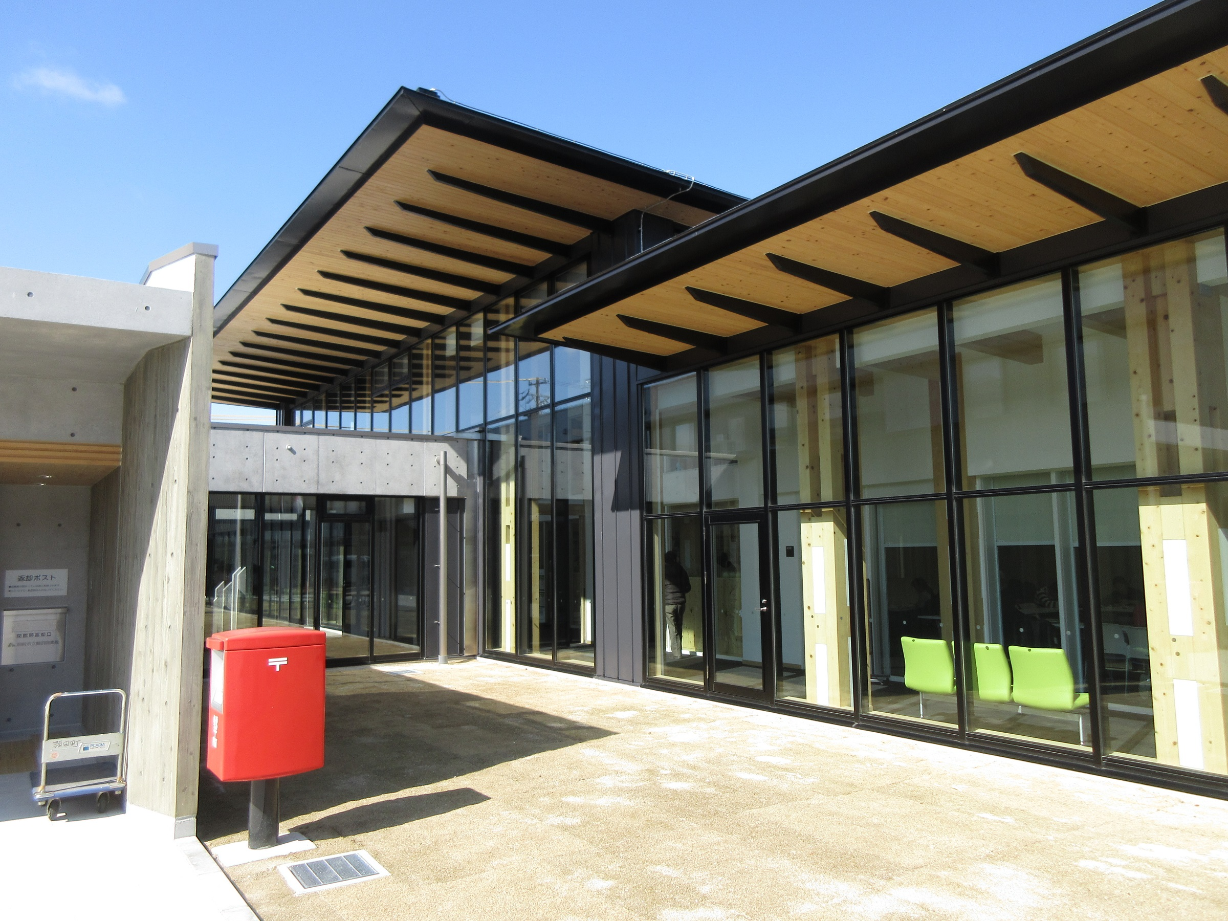 岡崎市額田センター（岡崎市樫山町）